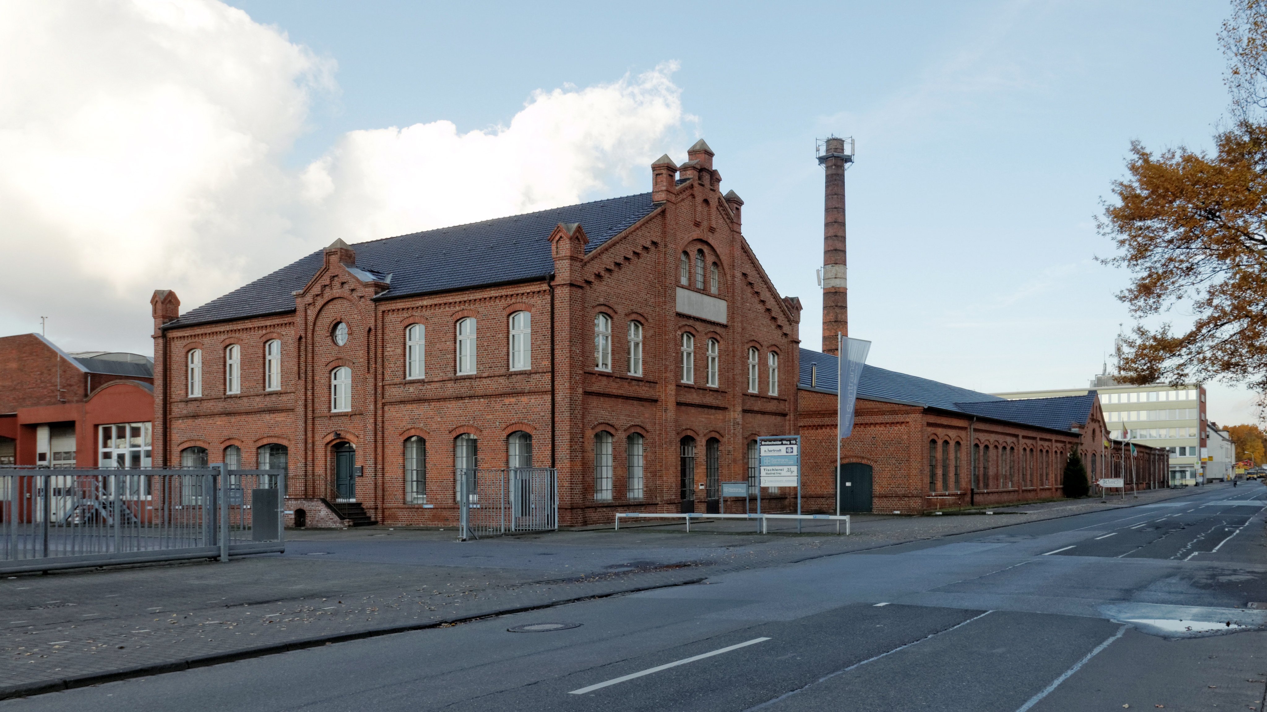 Ratingen-Lintorf, Breitscheider Weg 115-117; Hoffmann-Werke